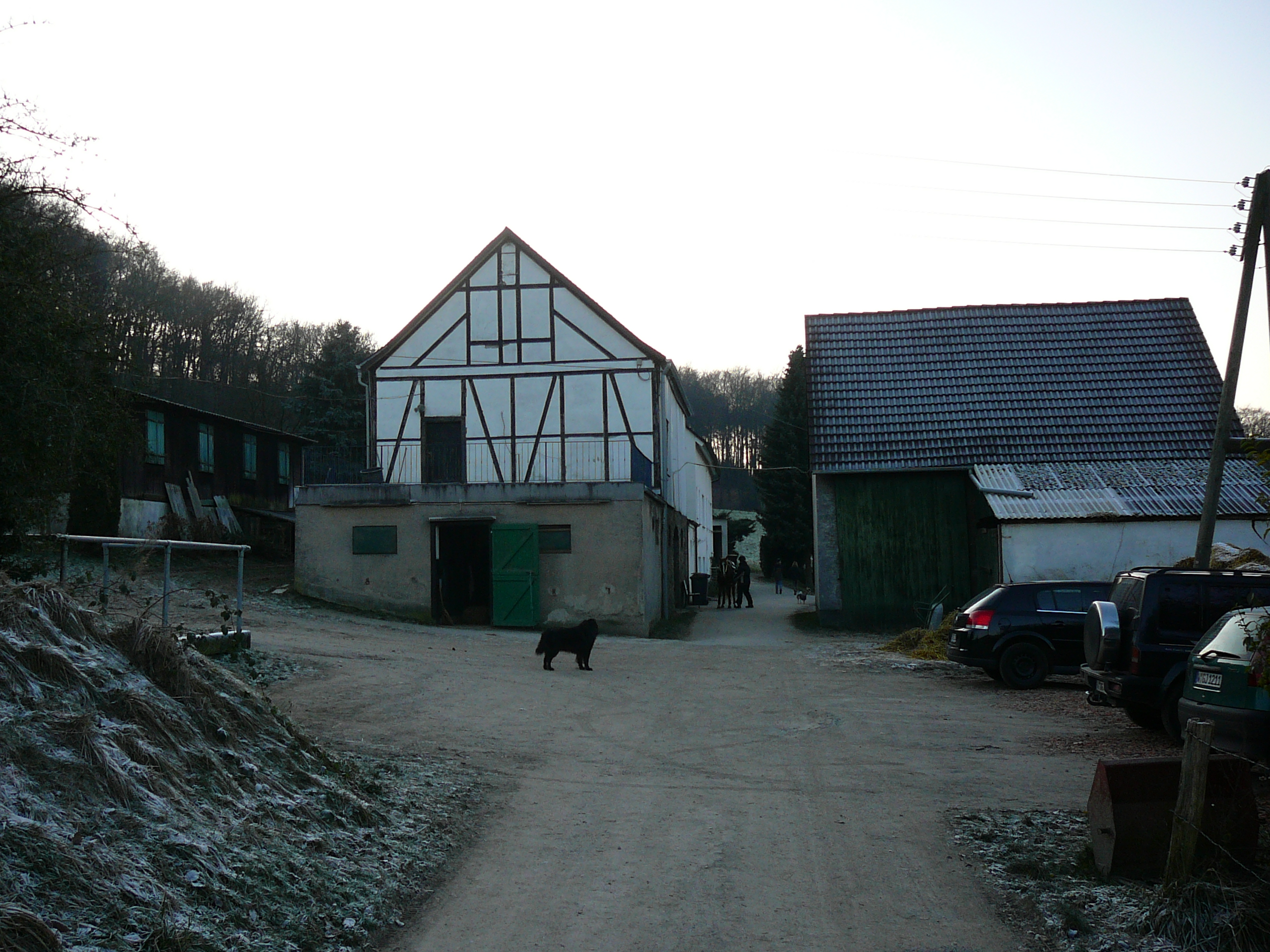 Mühlenpfad, Wuppertal